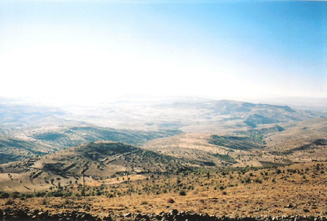 Ben çektim Ekim 2007